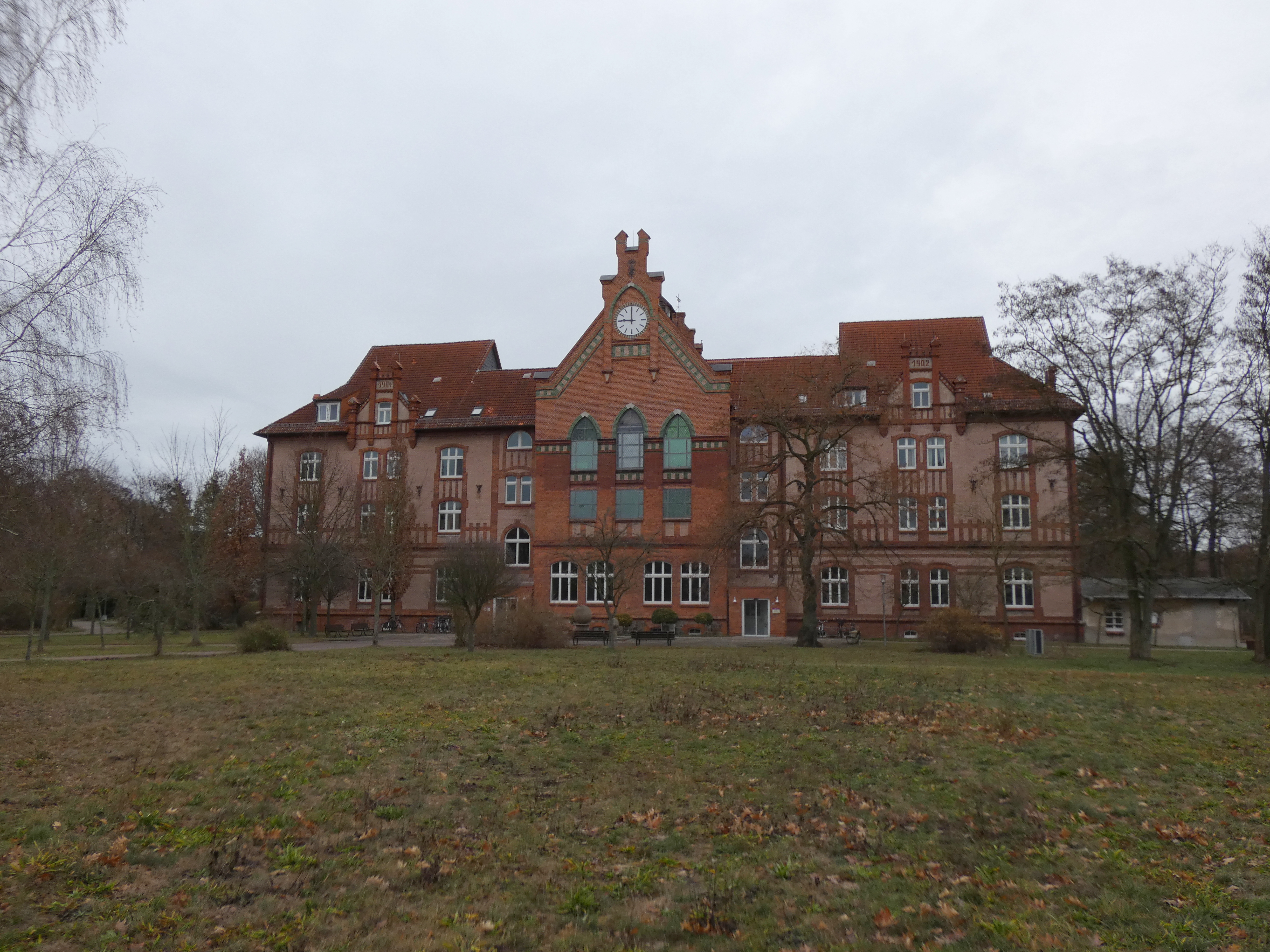 Hauptgebäude Hochschule Friedensau